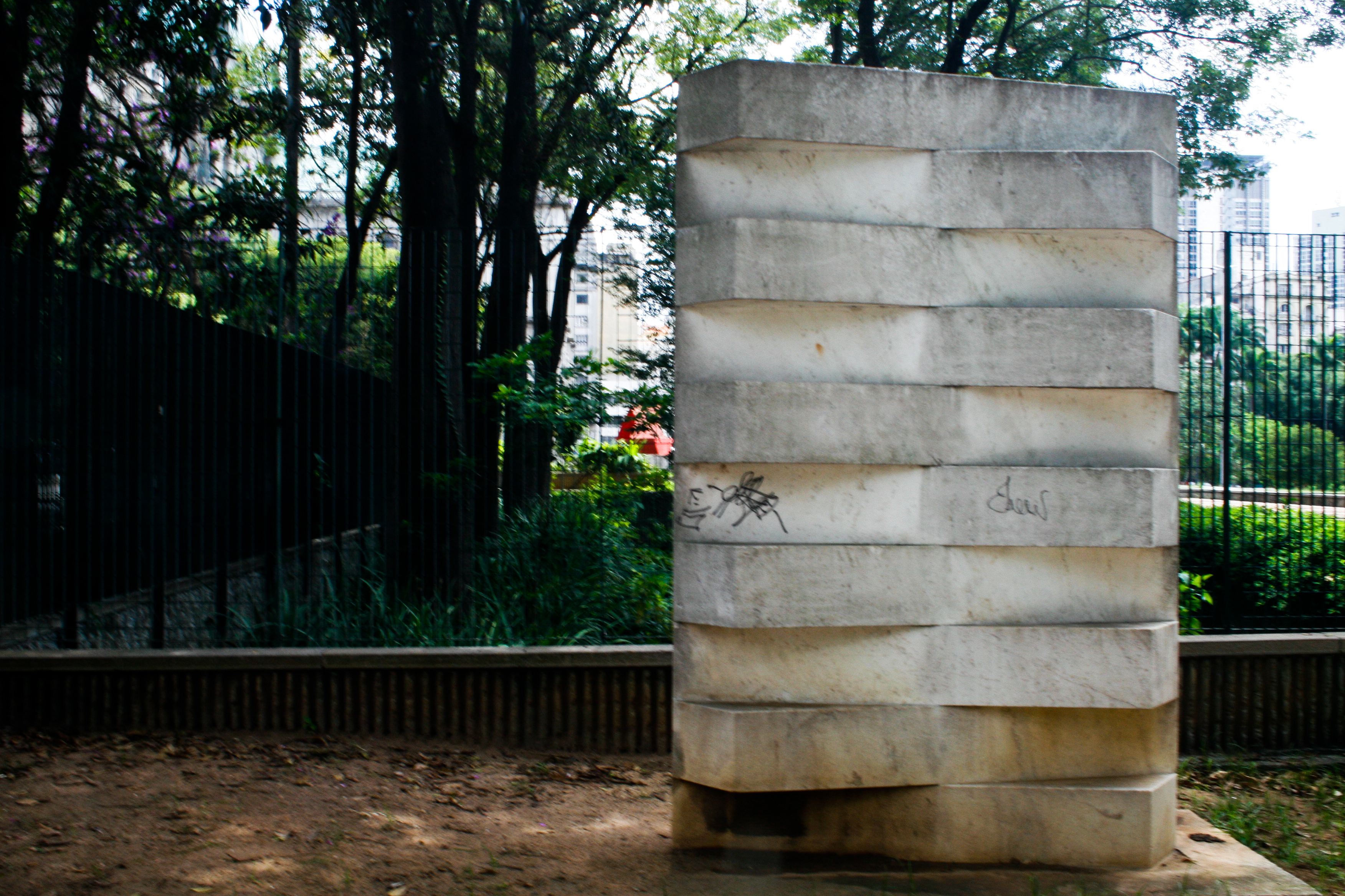 Praça da Sé, Centro. Foto por André Deak para o Arte Fora do Museu (